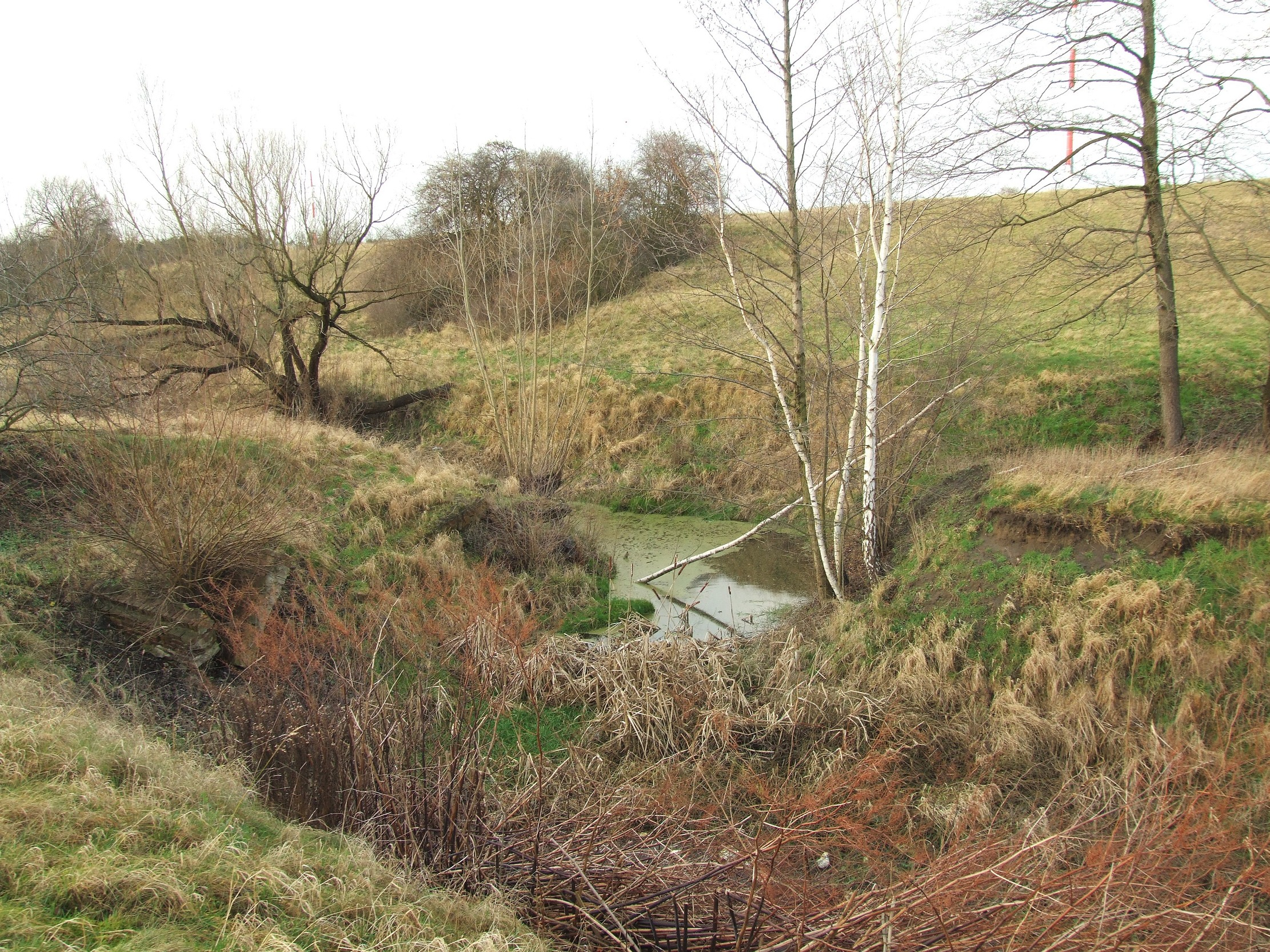 Złota Łącza - dolina rzeki w okolicach ulicy Foluszowej w Zielonej Górze Author: Mohylek 17:14, 26 January 2007 (UTC)